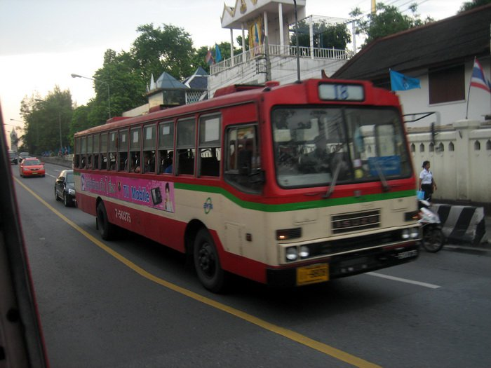 วิ่งระหว่าง อู่ท่าอิฐ - พระราม 7 - อนุสาวรีย์ชัยสมรภูมิ ผ่านบ้านผม นะครับ